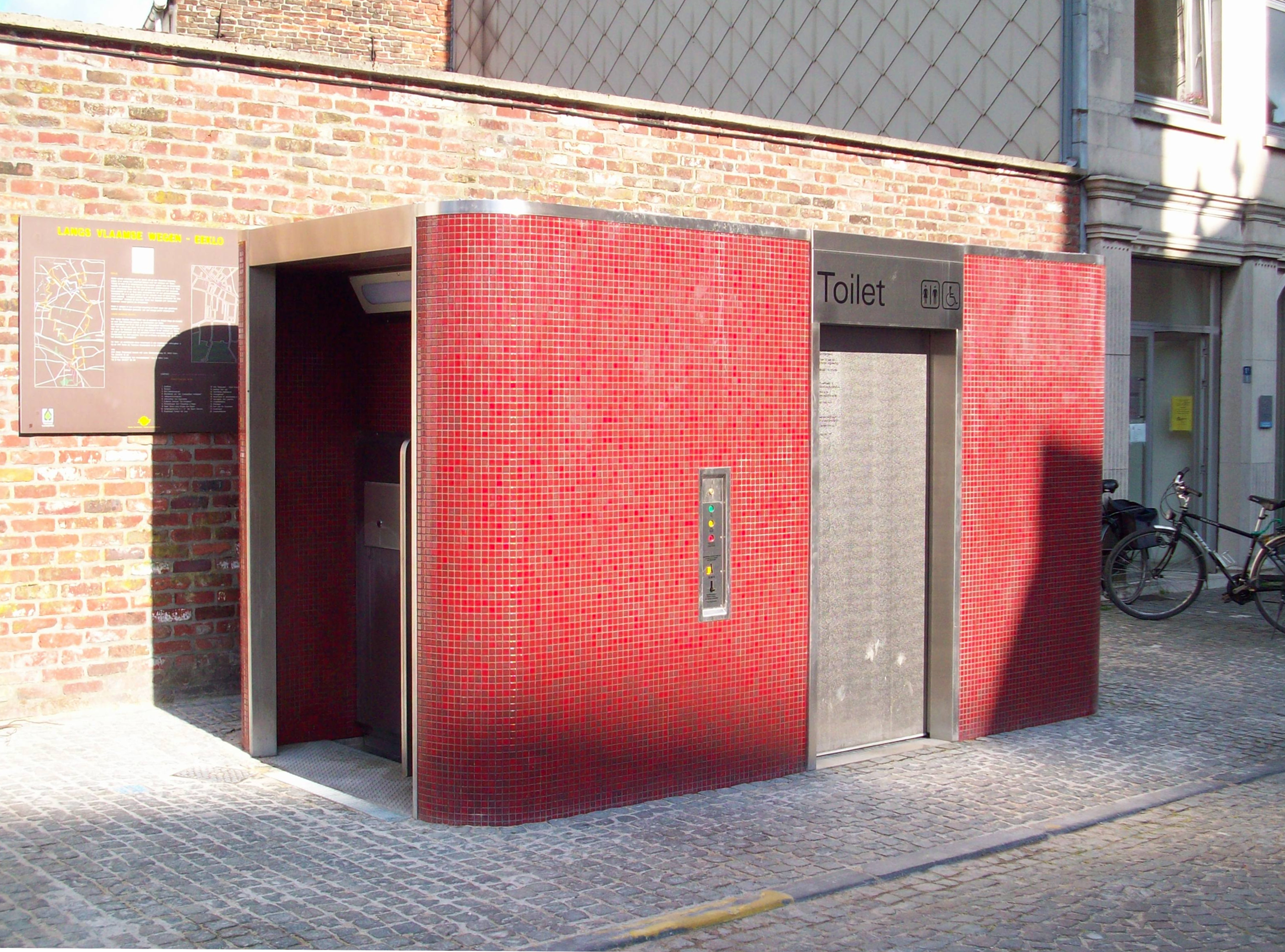 Openbaar toilet in Eeklo is geplaatst door en wordt technisch onderhouden door